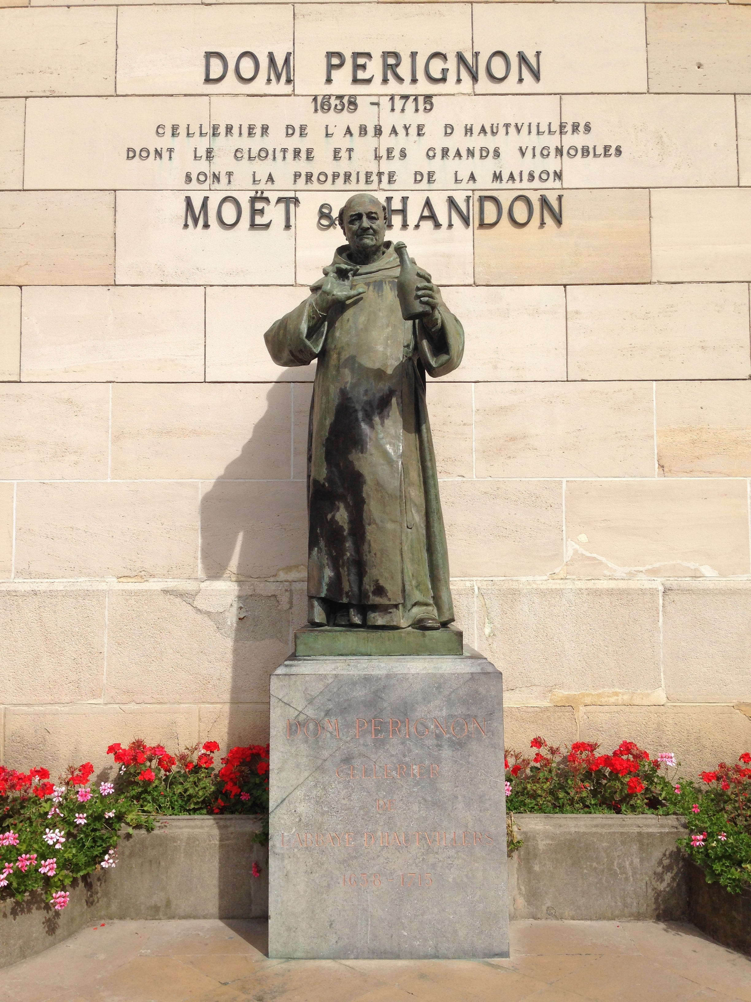 Dom Perignon statue